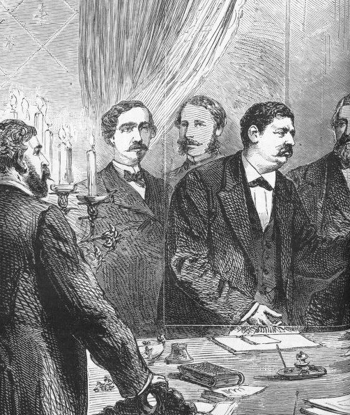 Détail de Séance de l'Union parisienne de la Presse, dans laquelle fut décidée la liste des candidats à l'élection du 2 juillet 1871. De gauche à droite : Janicot (Gazette de France), Eugène Veuillot (L'Univers), Bapst (Débats), De Villemessant (Figaro) et Neychens (Union).